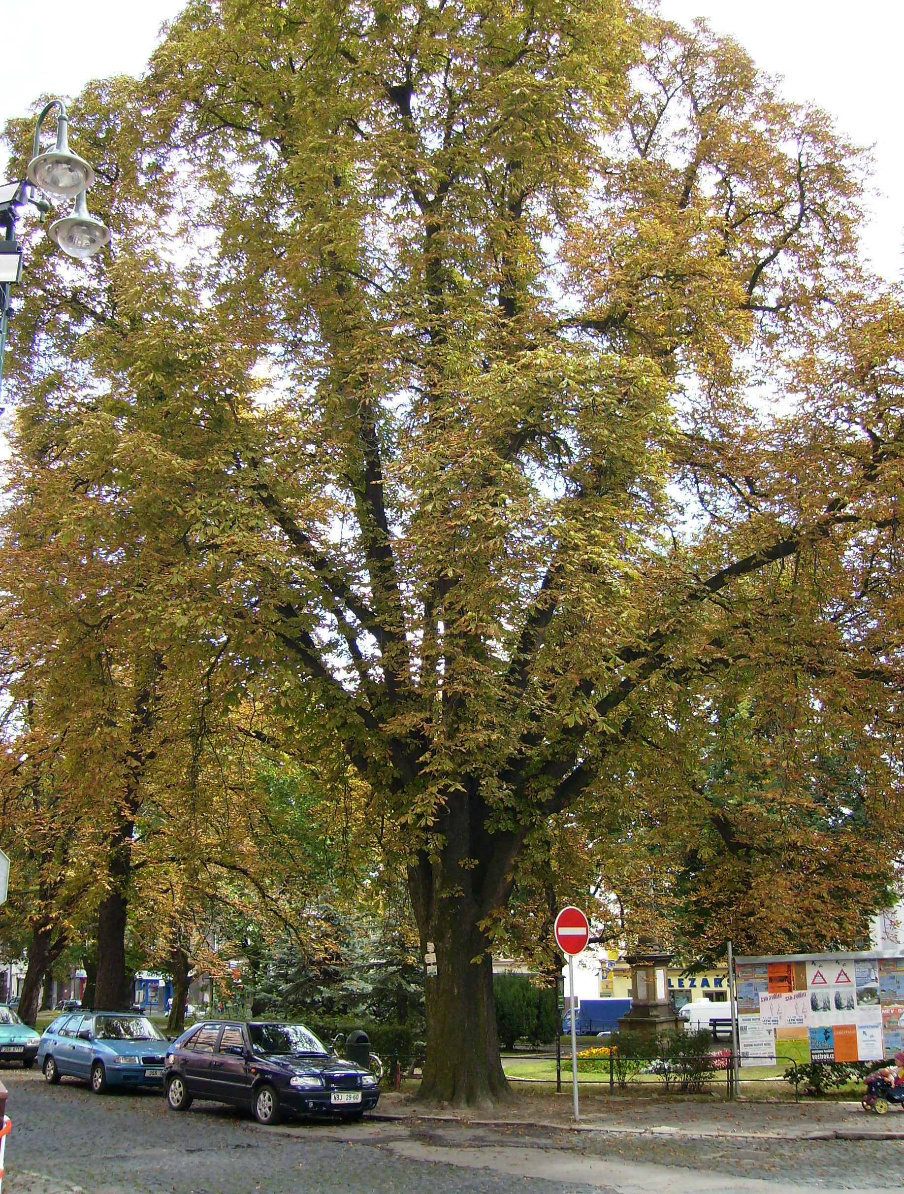 Jirovec madal v Lyse nad Labem na namesti Bedricha Hrozneho